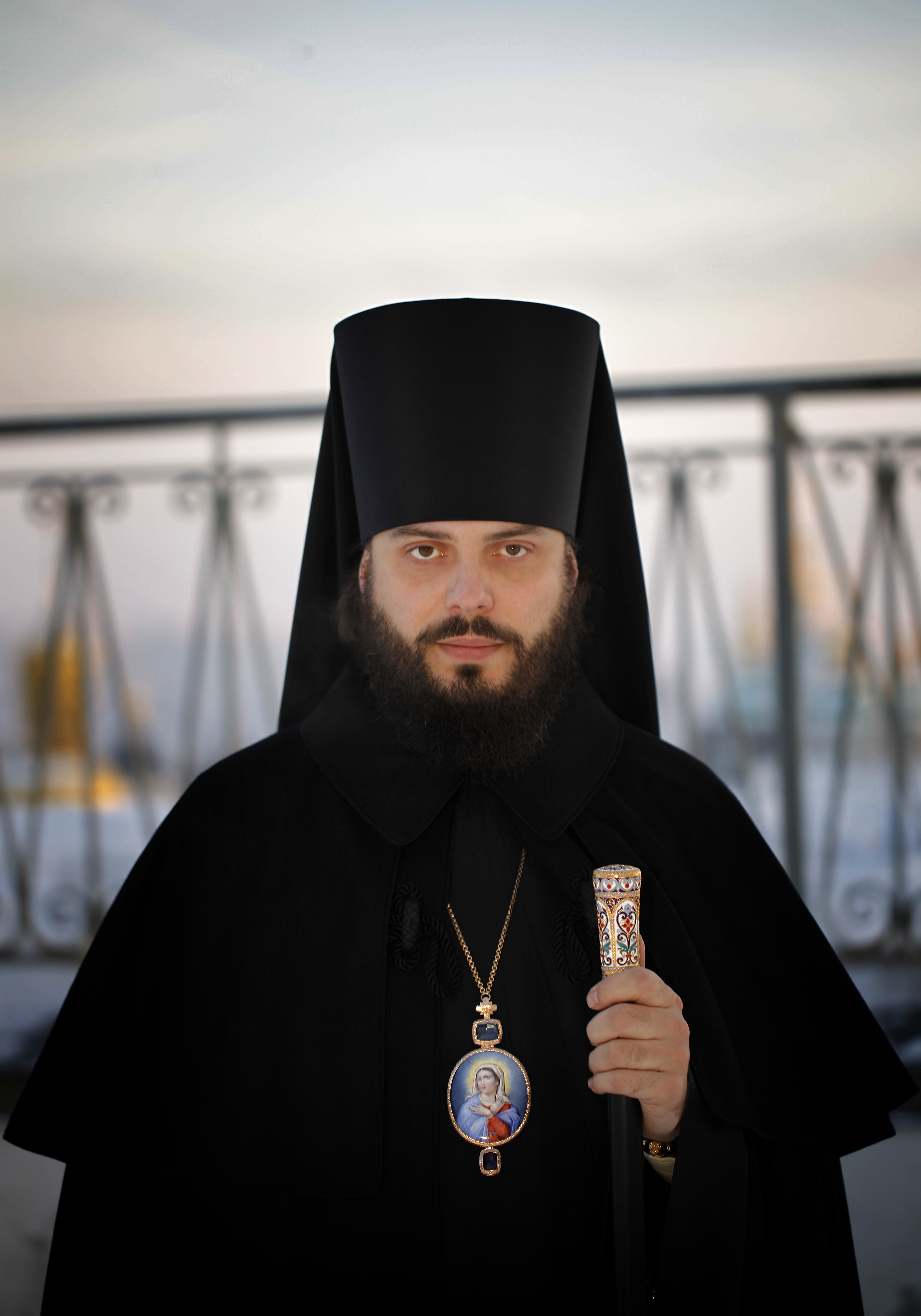 Епископ Дрогобычский, викарий Львовской епархии Филарет (Кучеров)